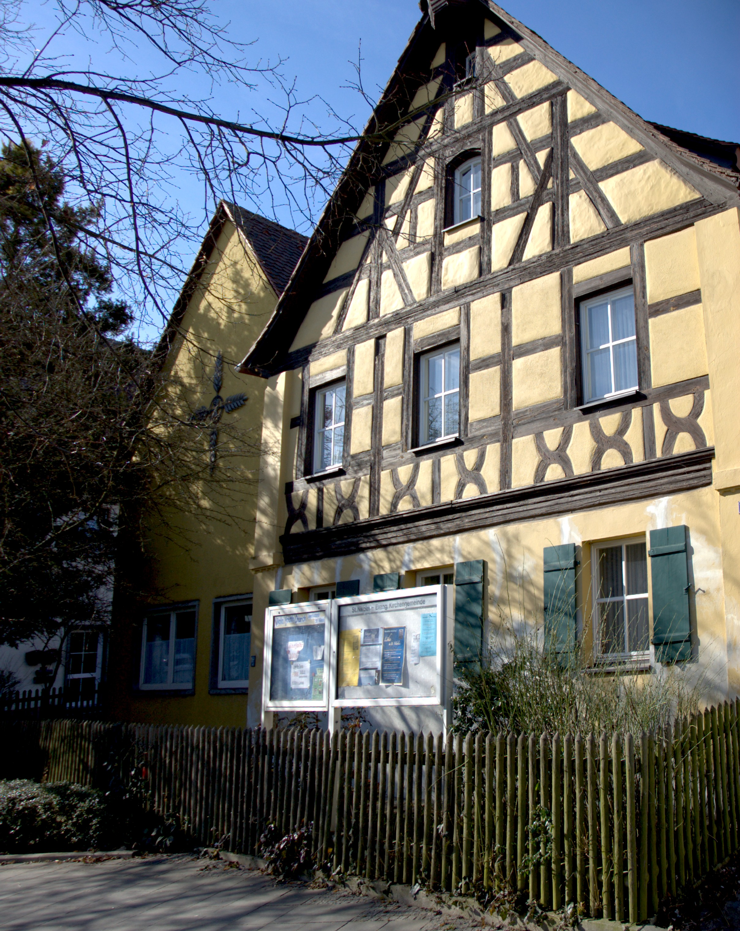 Löhehaus Neuendettelsau (Gemeindehaus von St. Nikolai)